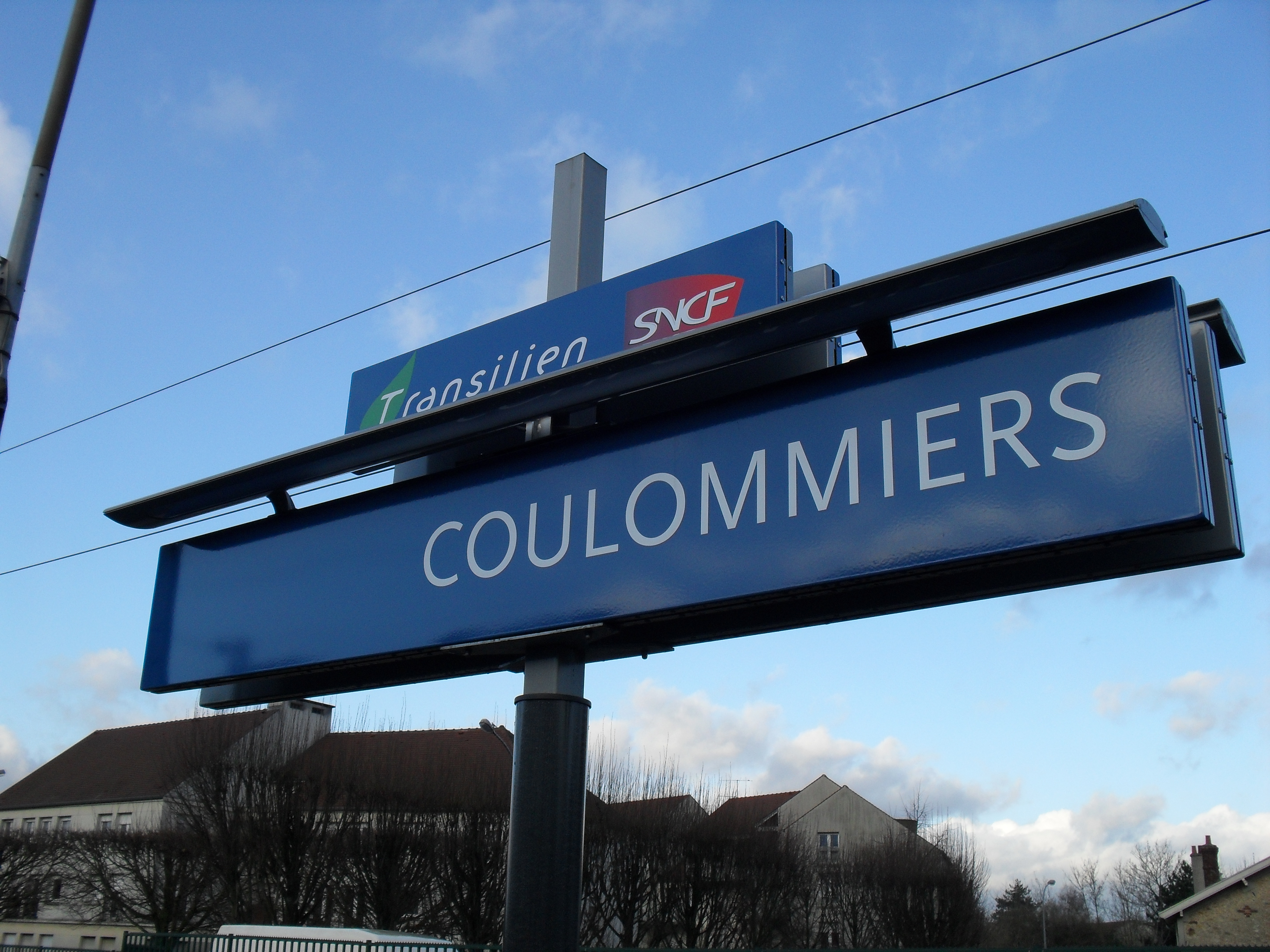 Signalétique à Coulommiers